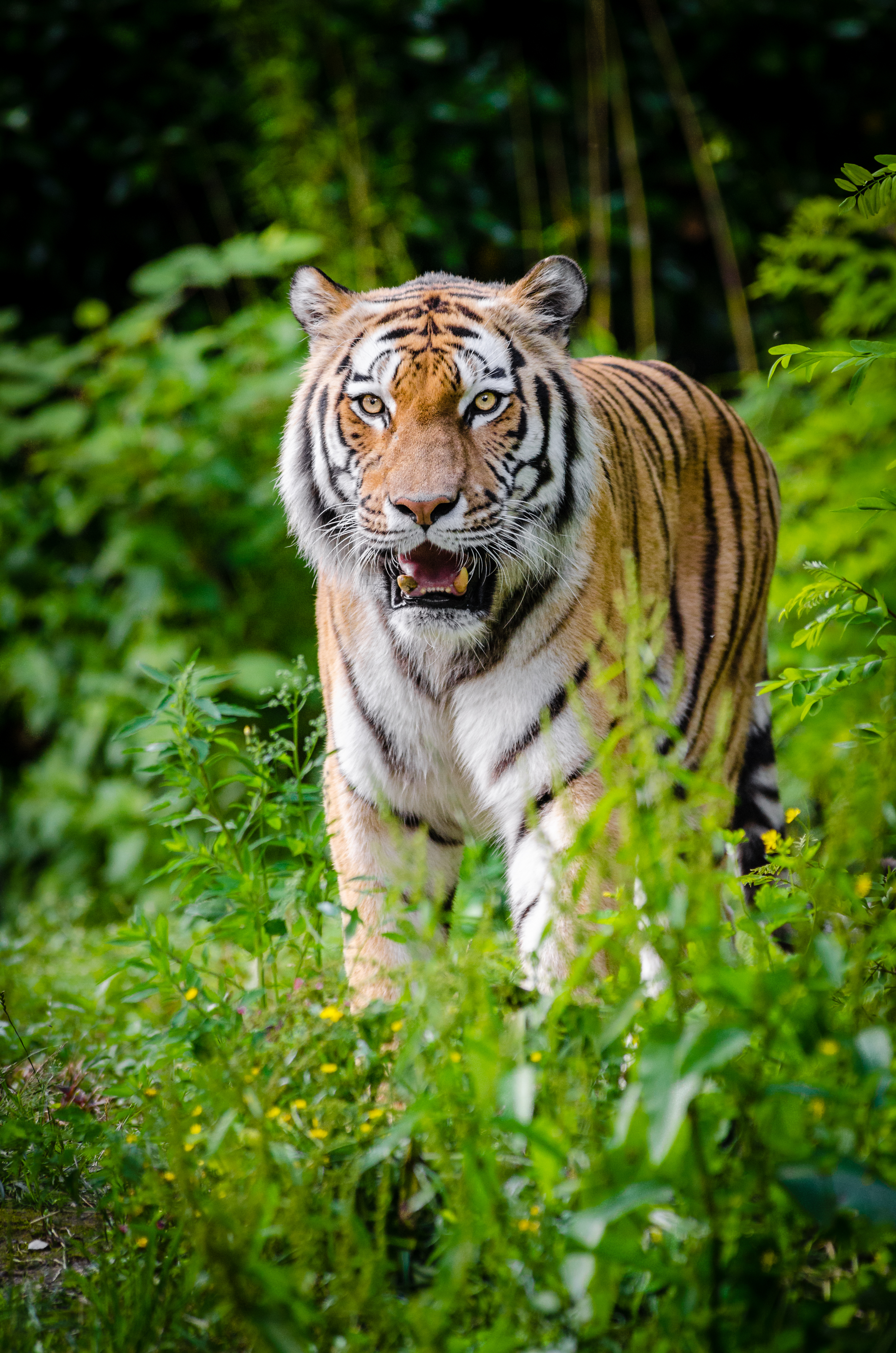 Siberian Tiger